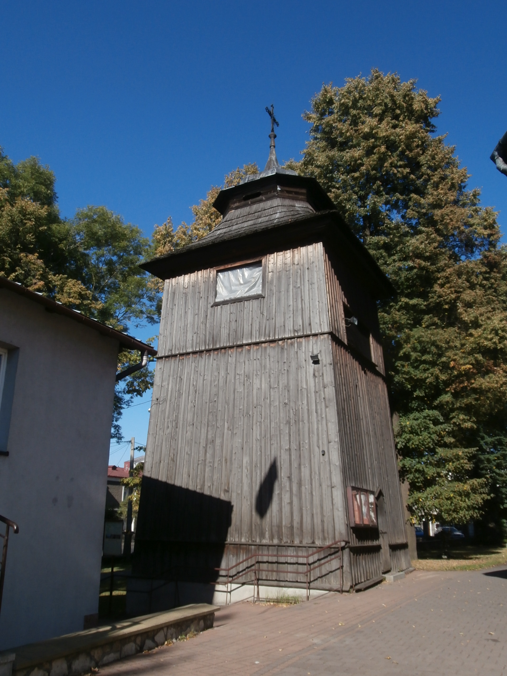 Drewniana dzwonnica przy kościele św. Mikołaja w Skale (miasto w województwie małopolskim).